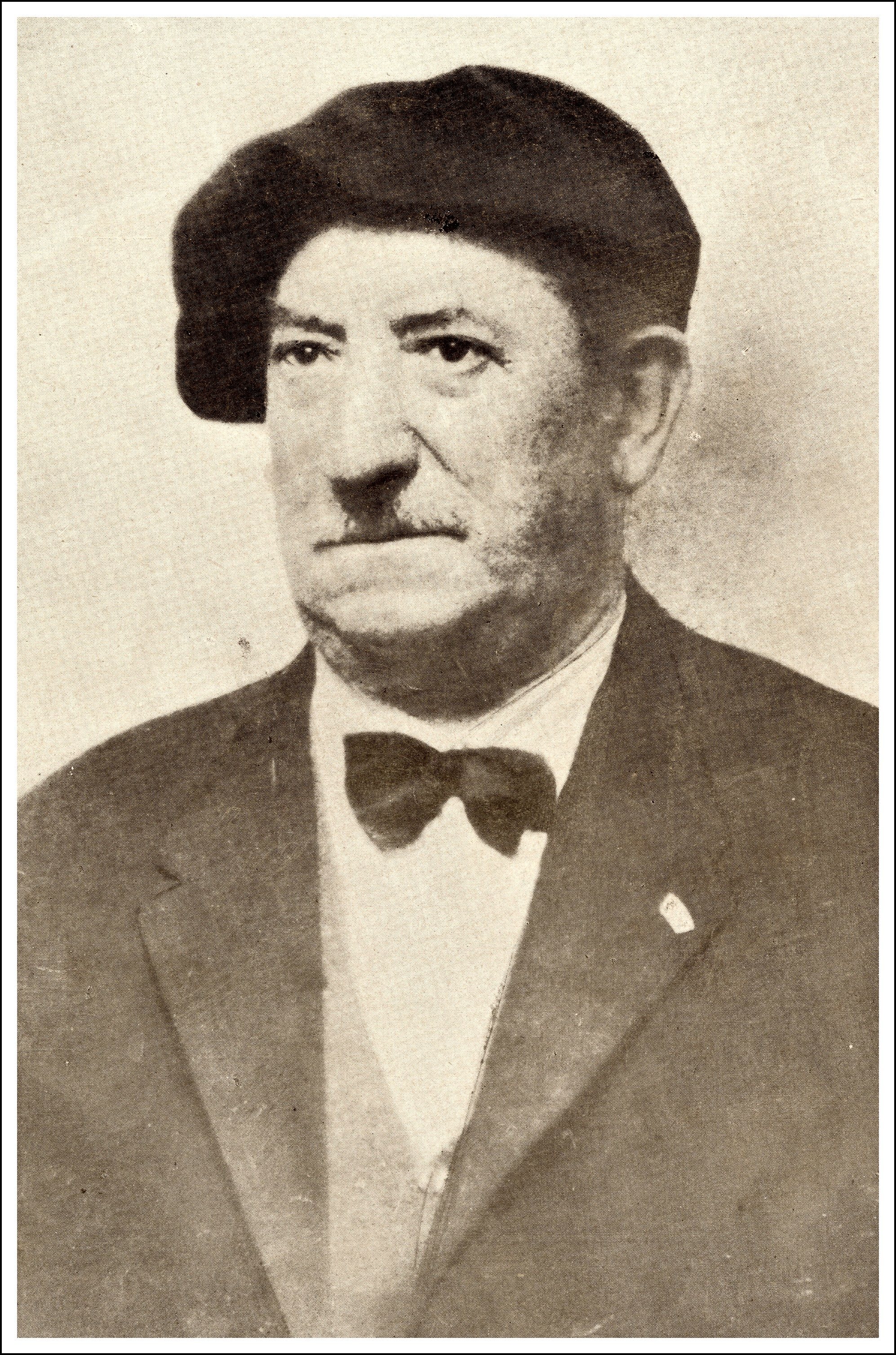 Martin Elolaren argazkia. Eresbilen artxiboa